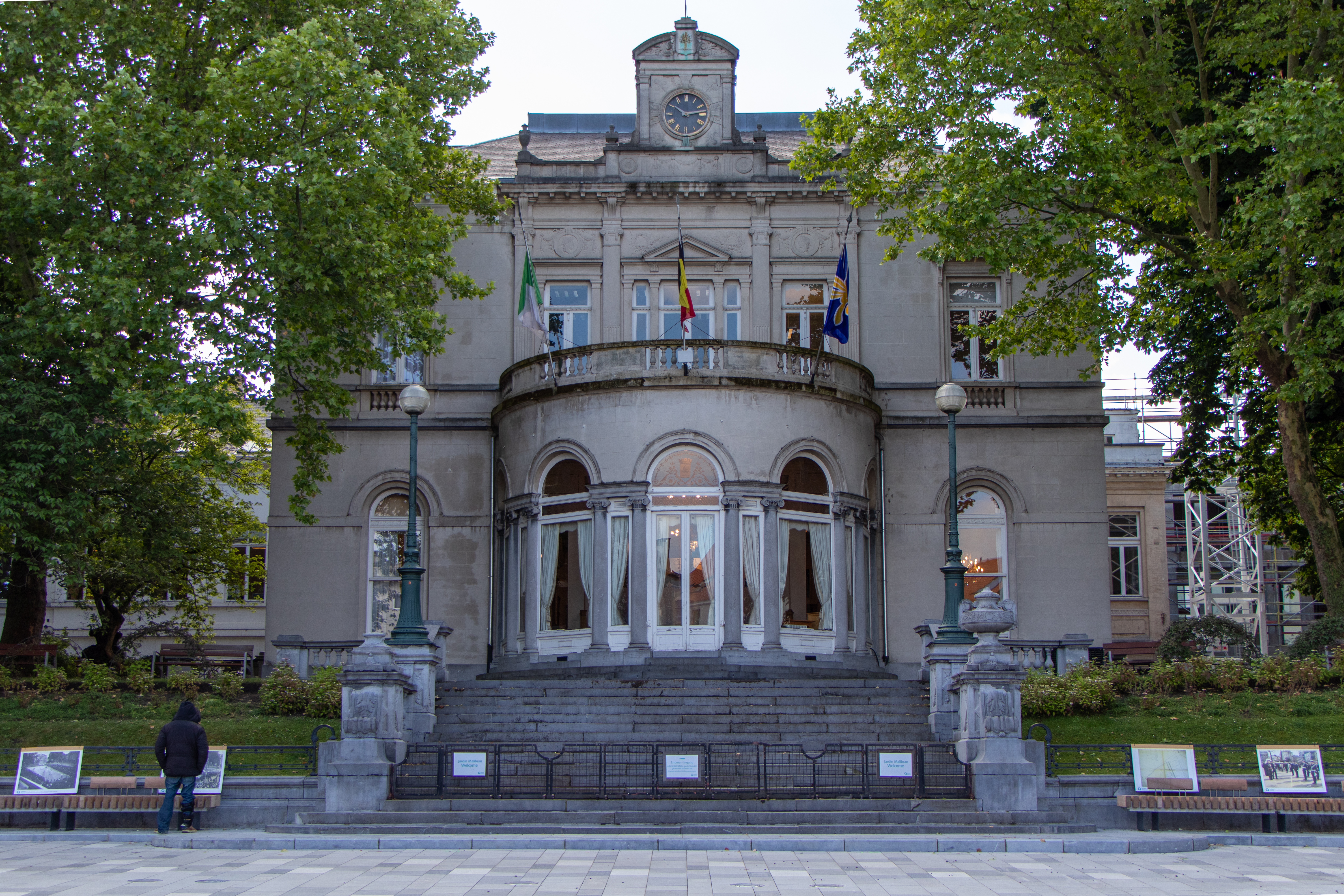 Maison communale d'Ixelles, photo actuel, 2019